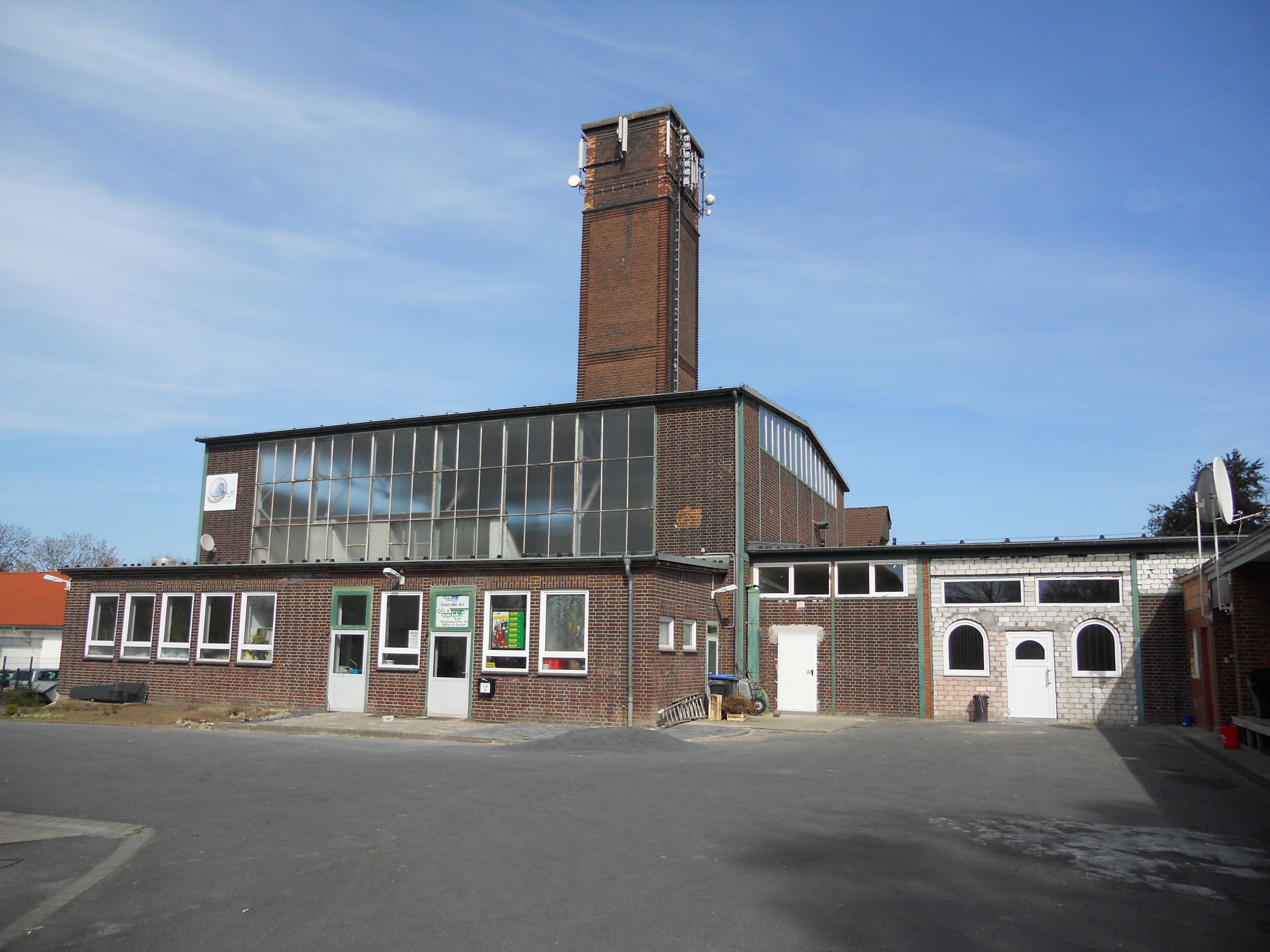 Ehemaliges zentrales Heizwerk der Wohnsiedlung der kanadischen und britischen Besatzungstruppen